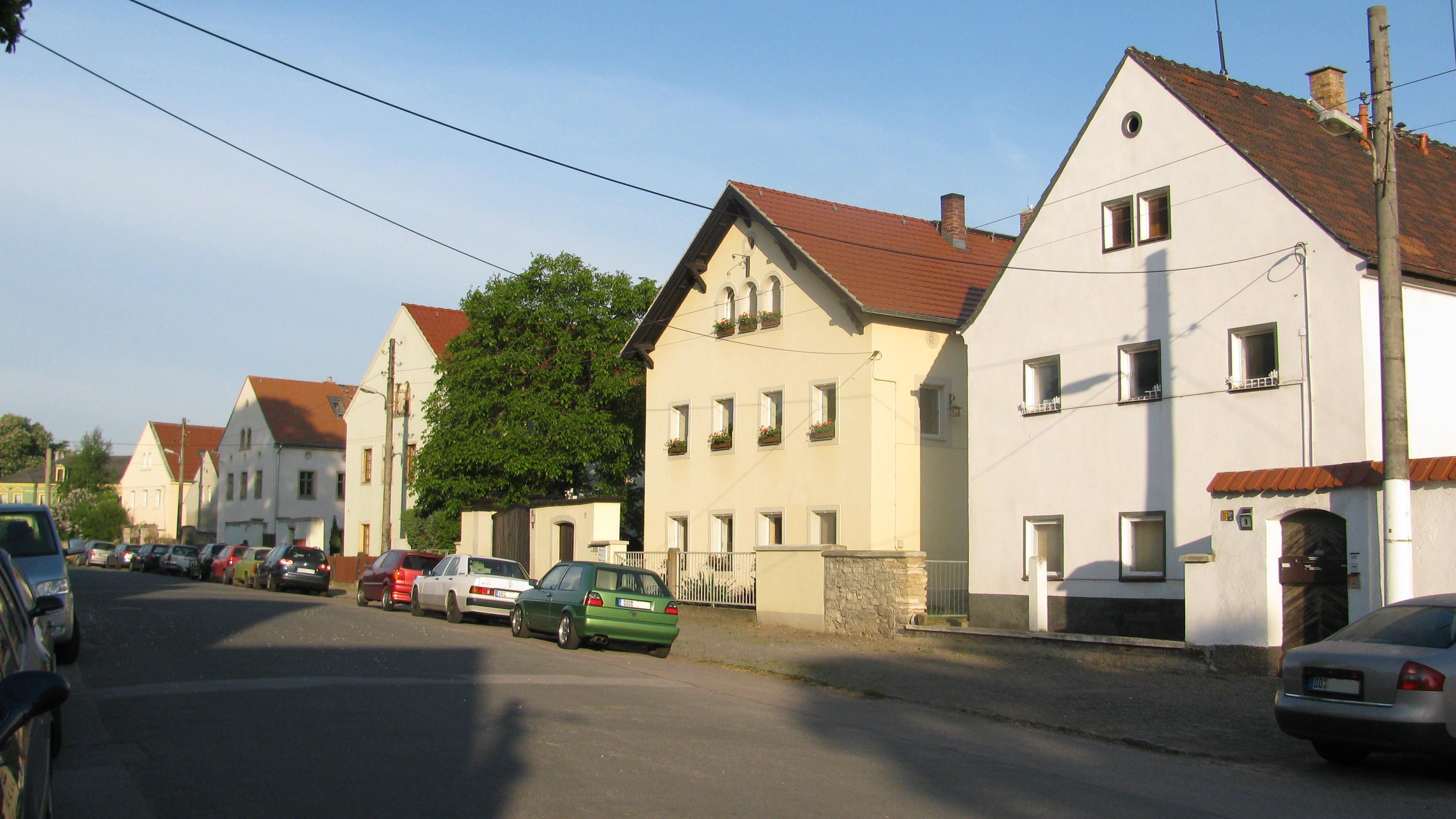 Dorfkern "Altstetzsch" in Stetzsch, Stadtteil von Dresden